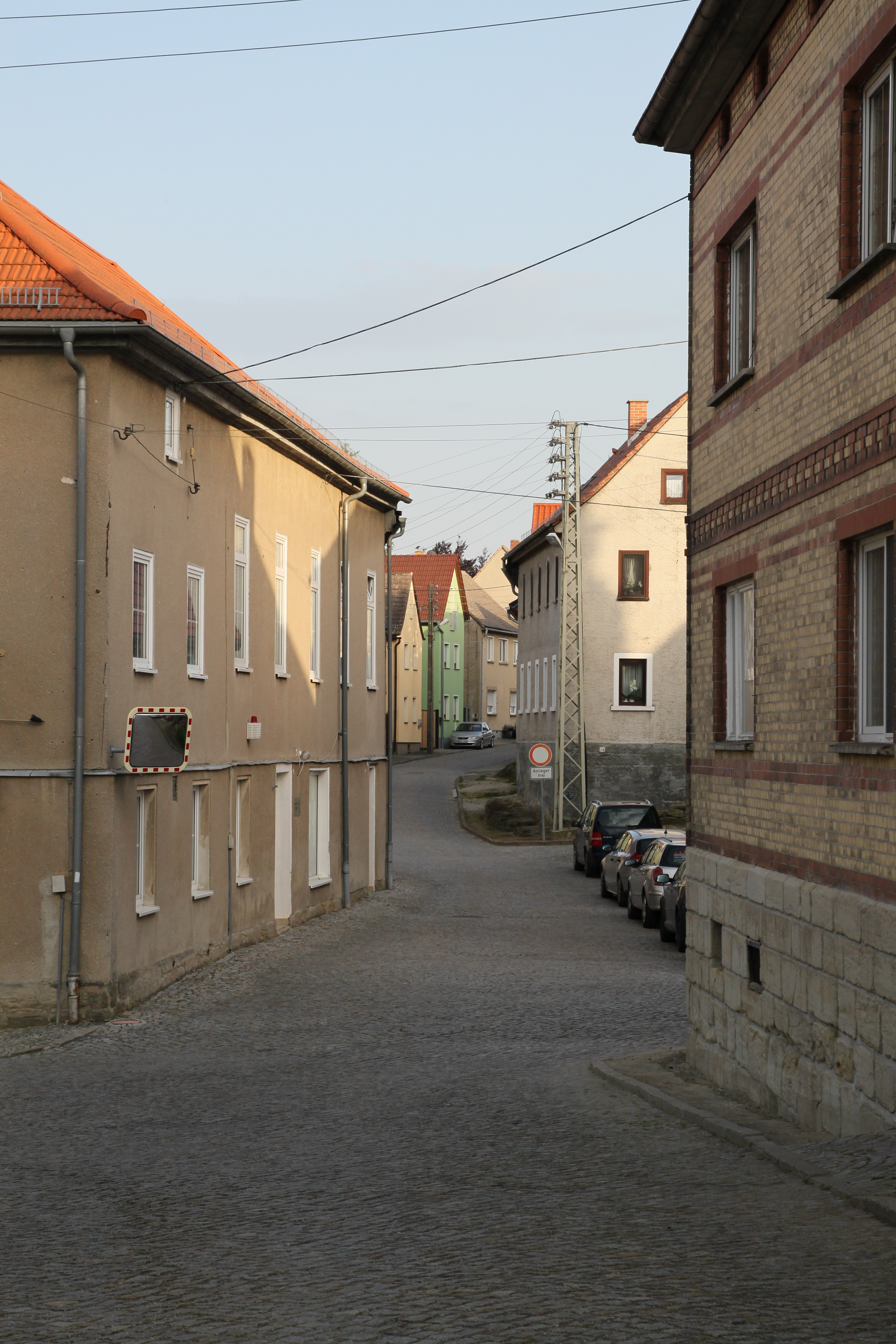 Dorfansicht Bobeck